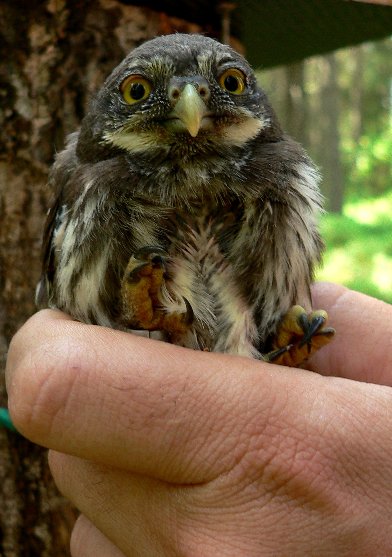 Pygmy owl (Glaucidium passerinum), chicken; Kauhava, western Finland